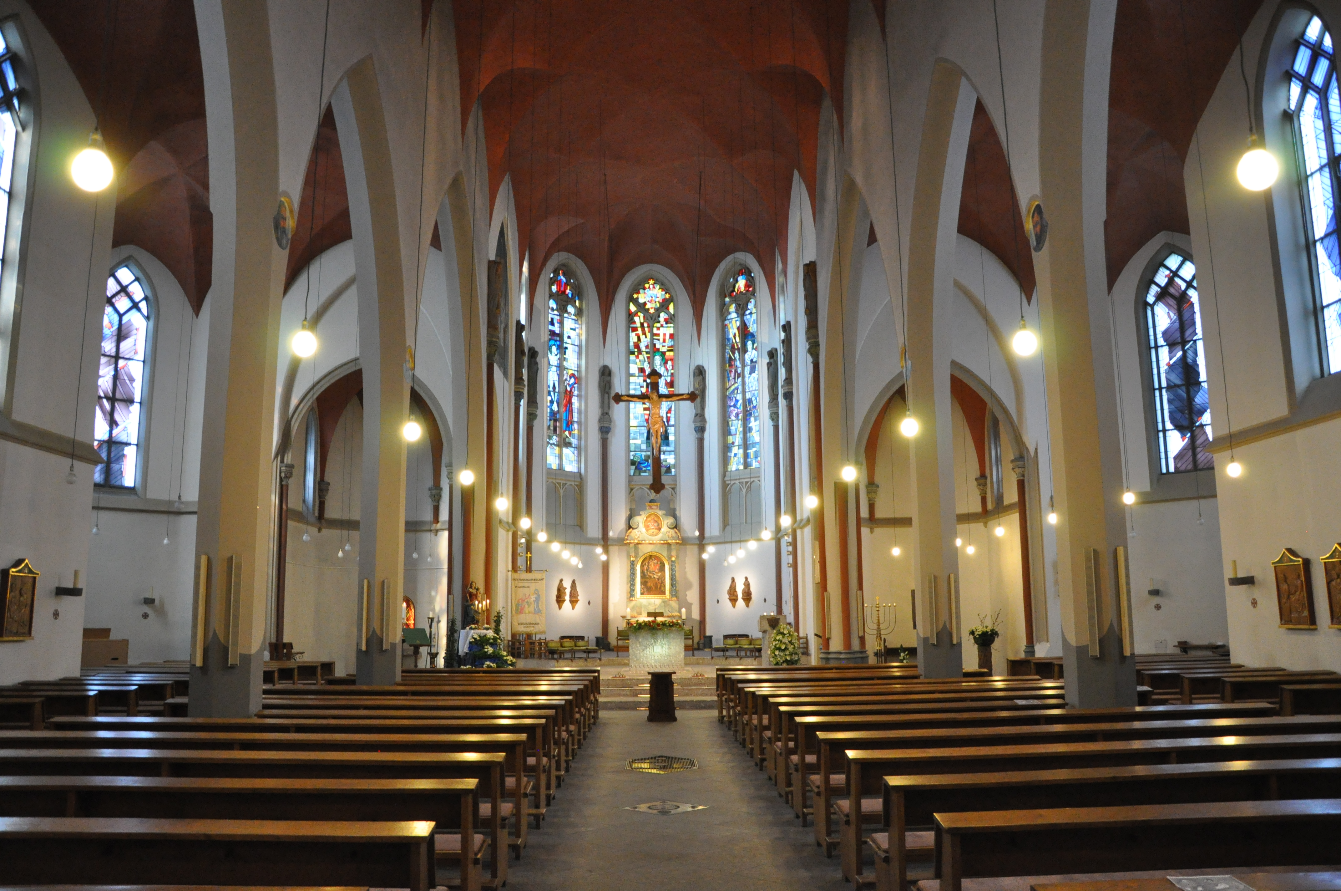 Innenansicht der St. Andreas-Kirche Korschenbroich